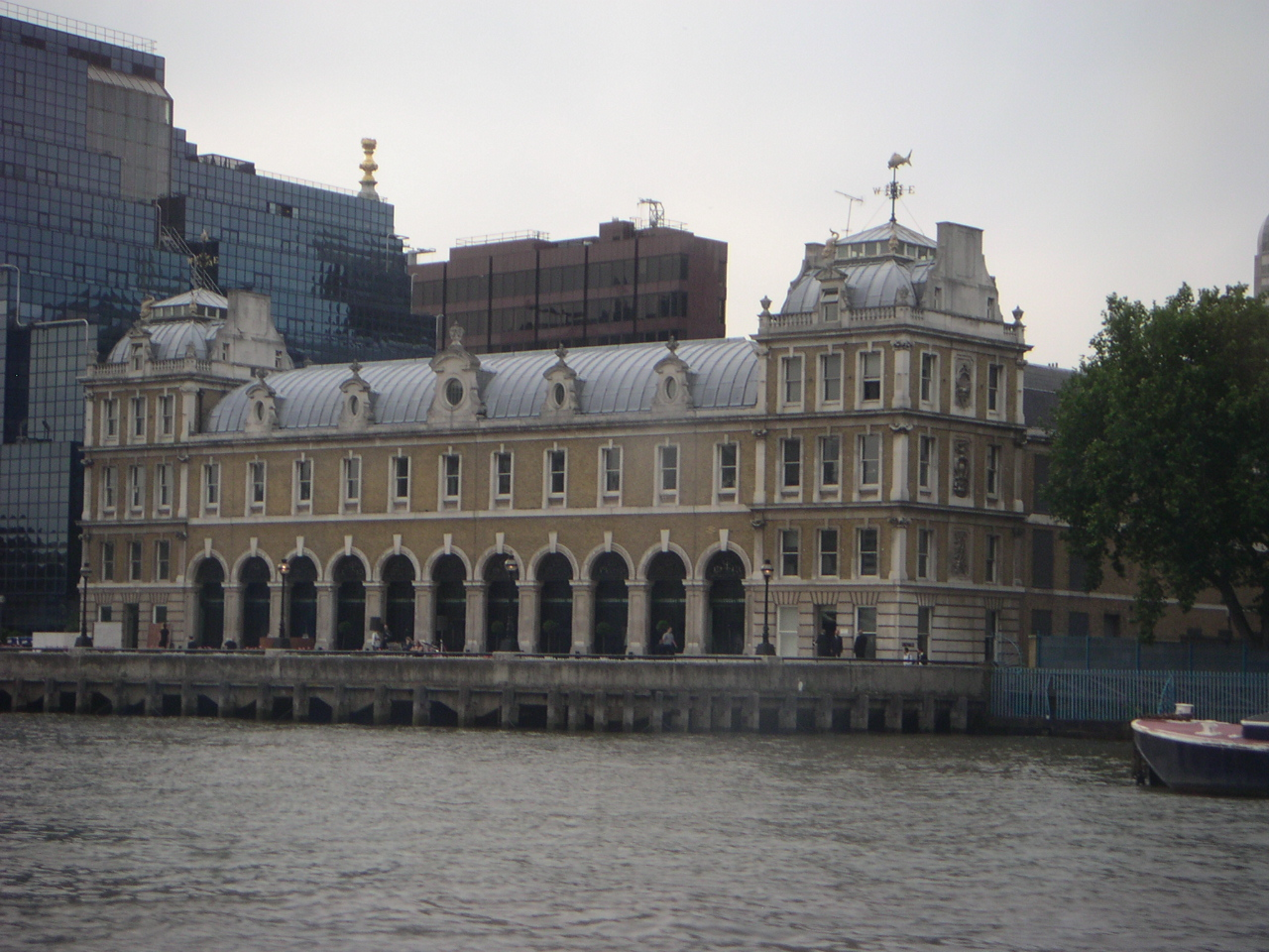 Billingsgate Market